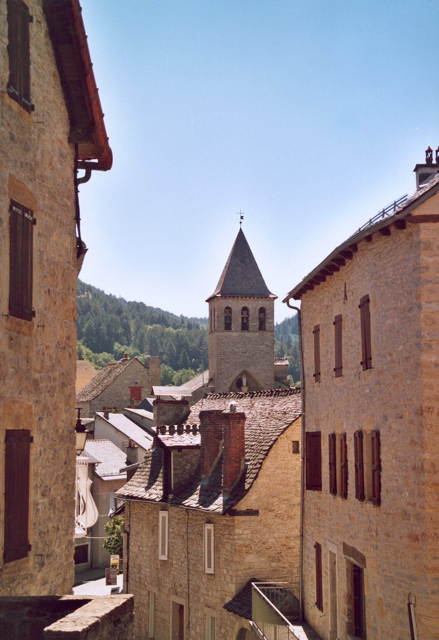 France Lozère Chanac Photographie prise par GIRAUD Patrick Août 2005